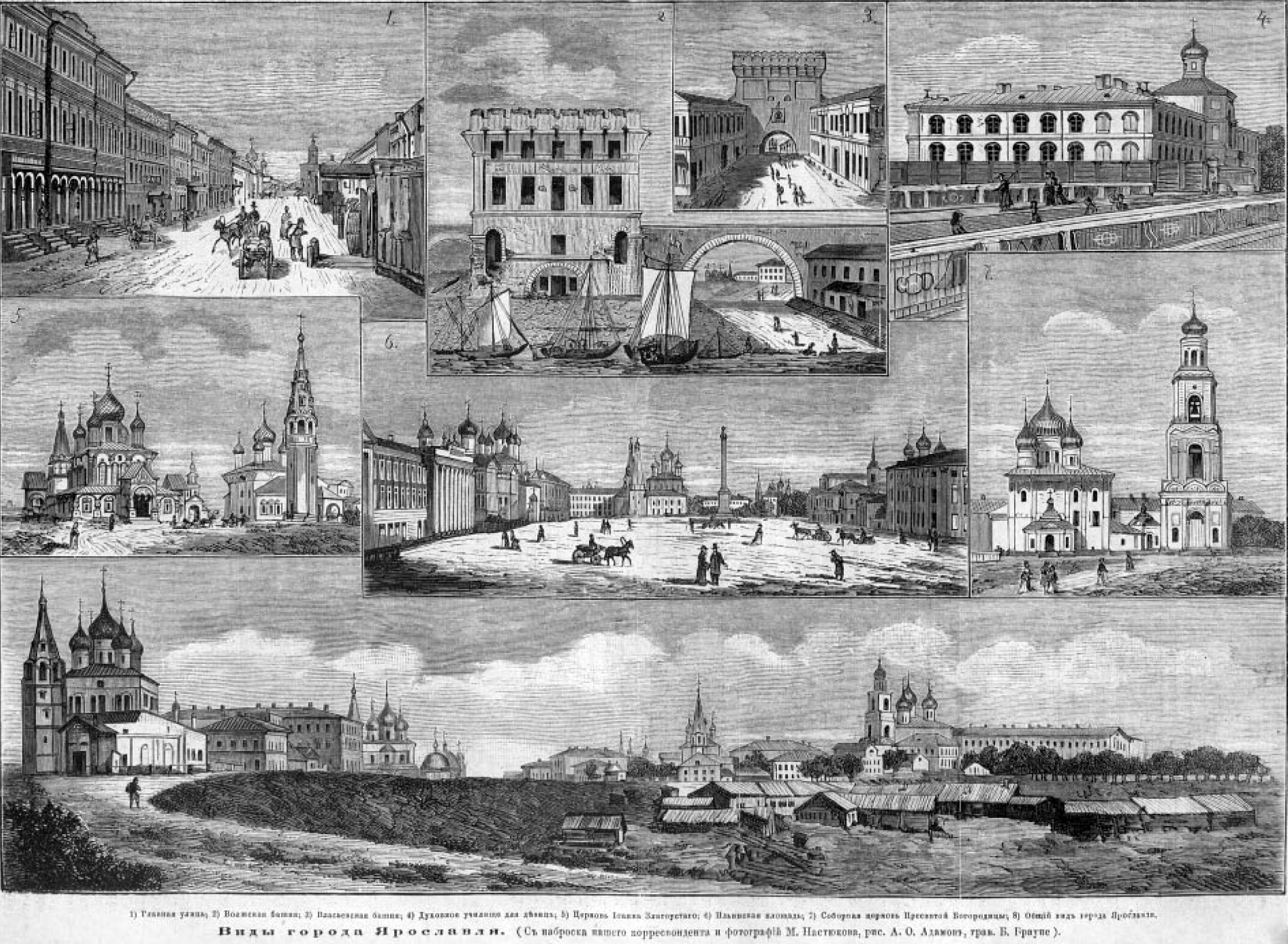 Виды Ярославля, 1877 год